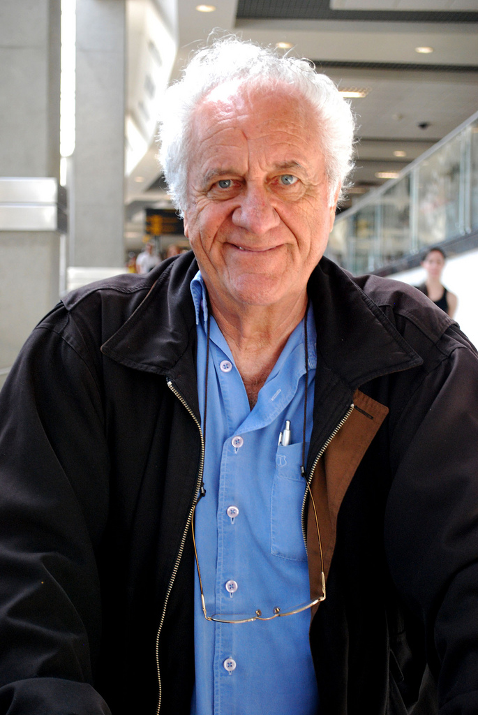 Rolando Boldrin no Aeroporto de Congonhas, São Paulo.